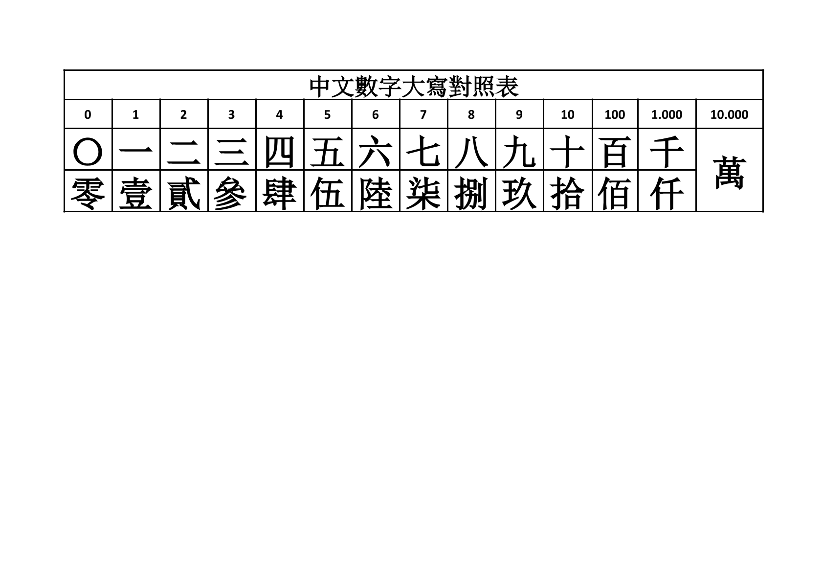 Chinesische Zahlen im Finanzwesen - Vegleichstabelle